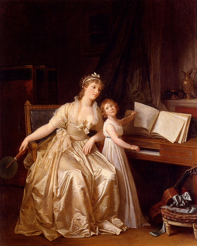 La Leçon de PianoThe Piano Lesson